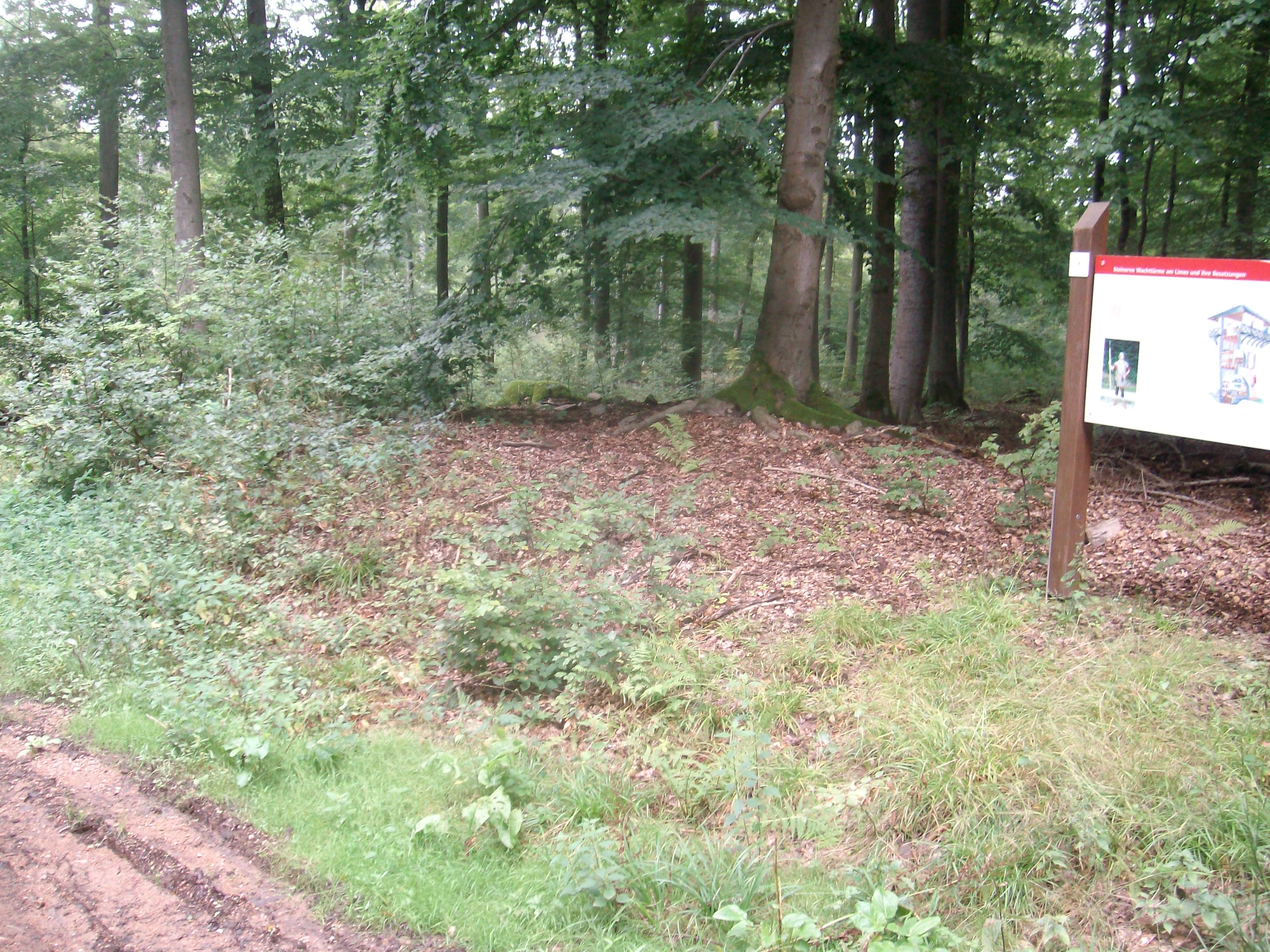 Wachposten 3/5 am Limes